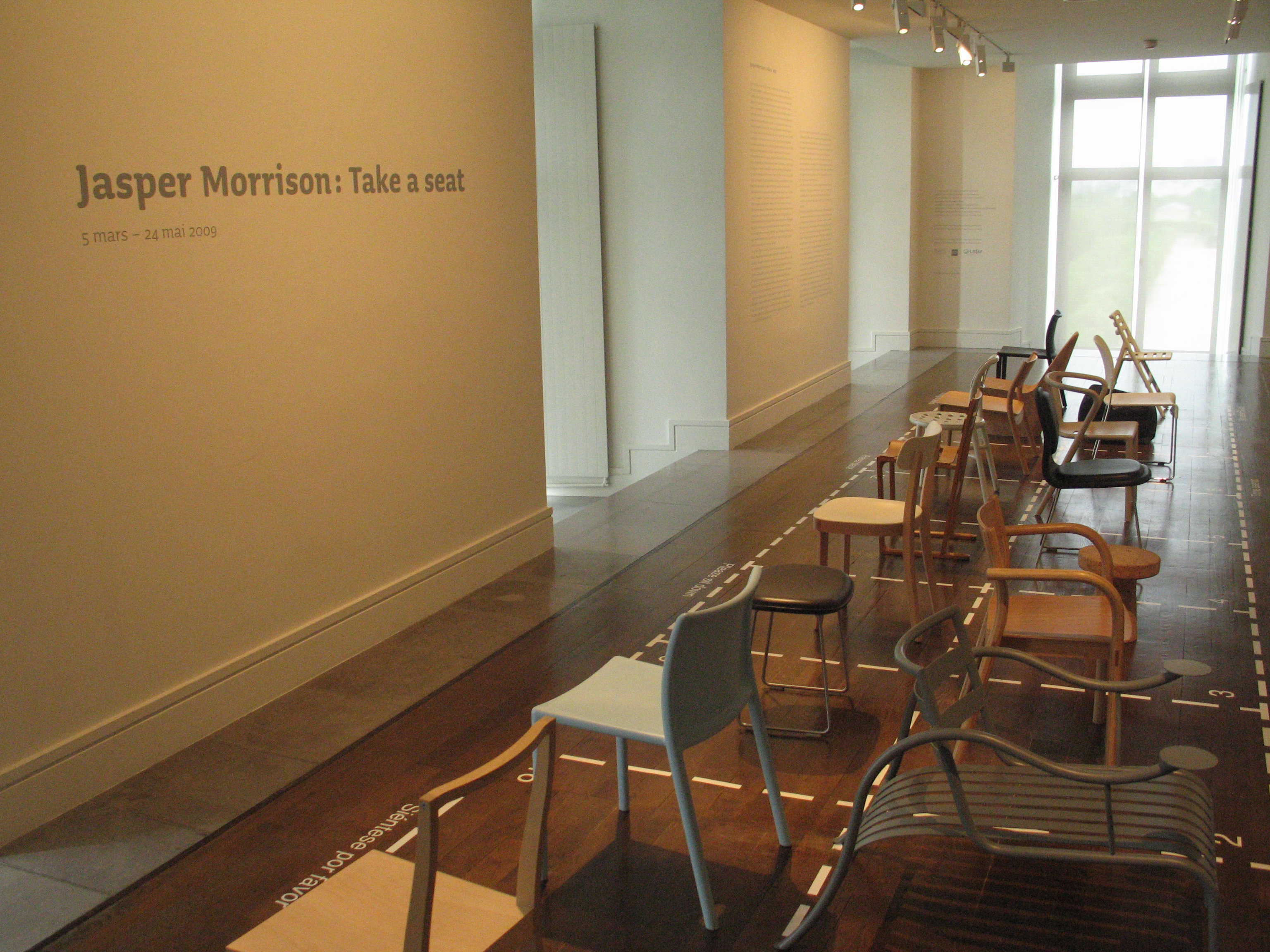 Musée des Arts Décoratifs